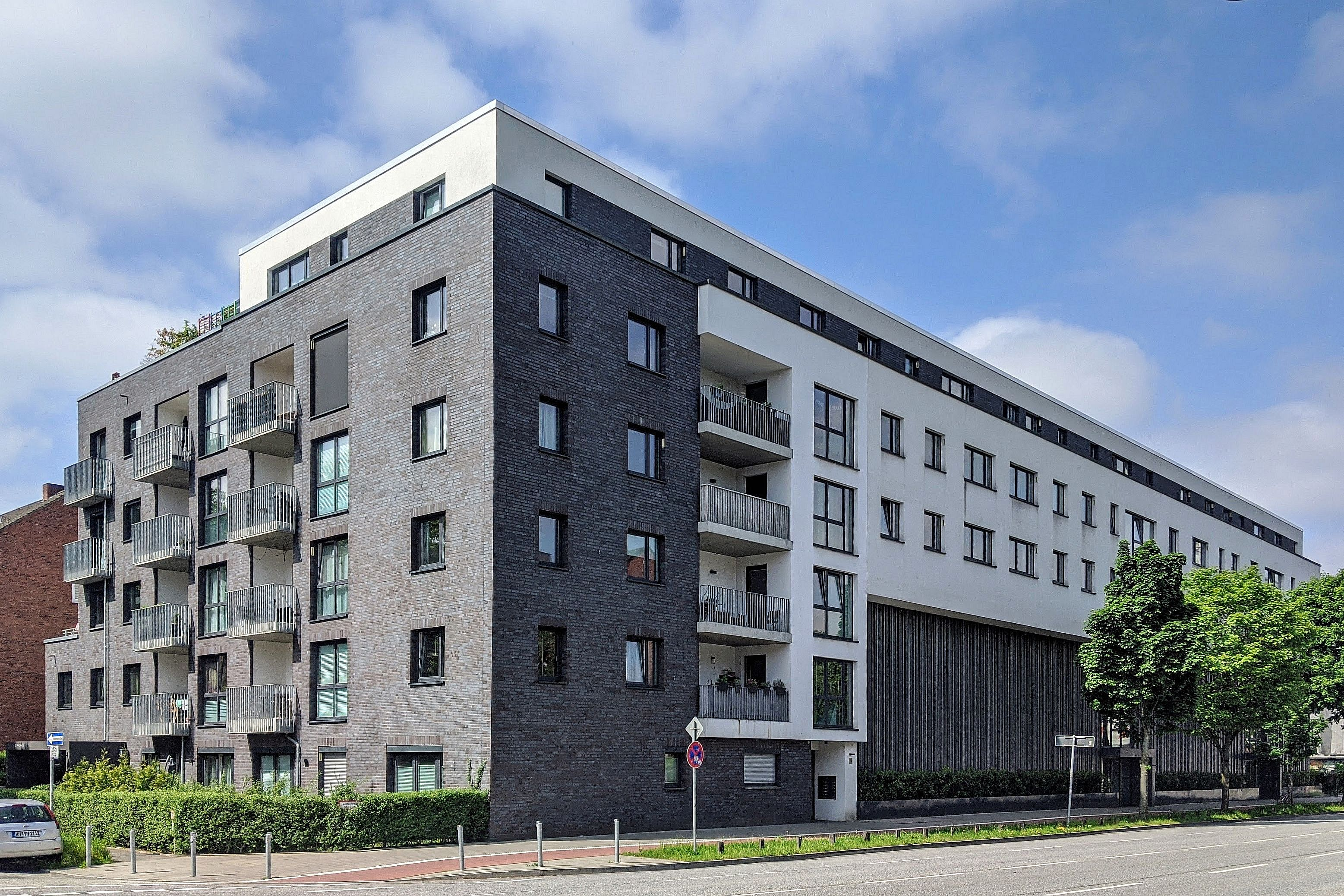 Drosselstraße 15 in Hamburg-Barmbek, neuerbauter Wohnblock über einer ehemaligen Zivilschutzanlage (Mehrzweckanlage aus Parkhaus mit Bunker)